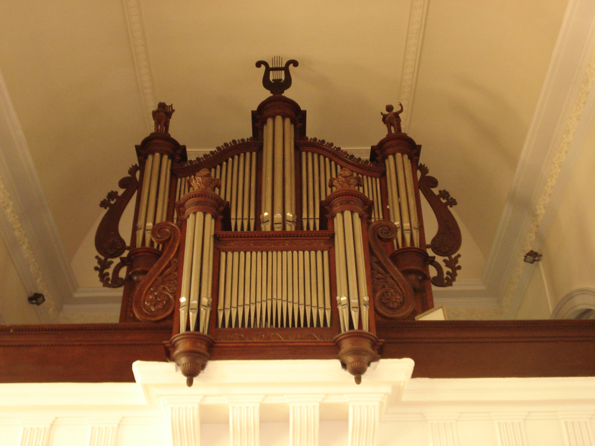 Église Saint Colomban de Bains-les-Bains (Vosges, France), orgues de Nicolas-Antoine Lété de Mirecourt, de 1843, transformées en 1901 par Henri DIDIER, restaurées en 1986 par Christian Guerrier avec retour à l'état d'origine.